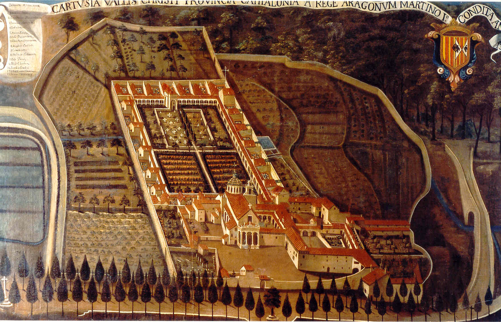 Quadre que representa la cartoixa de Valldecrist (Altura, Alt Palància) en el segle XVII o XVIII.